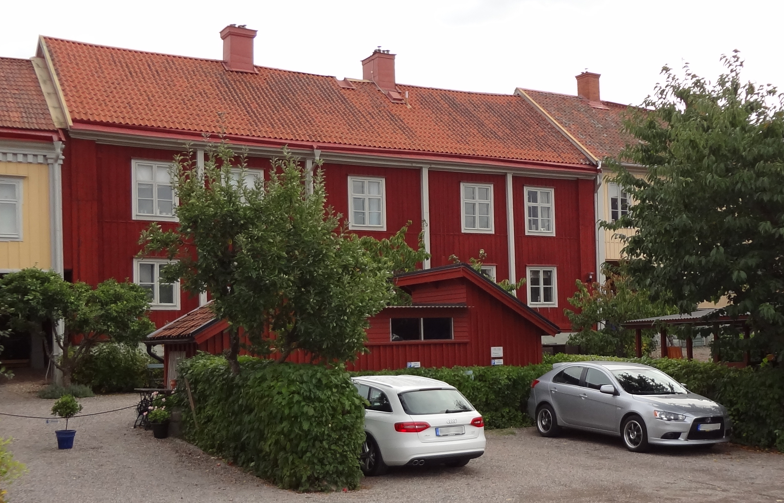 Öster- och Västerrekarne häraders tingshus (Stengeten 3 och 4)